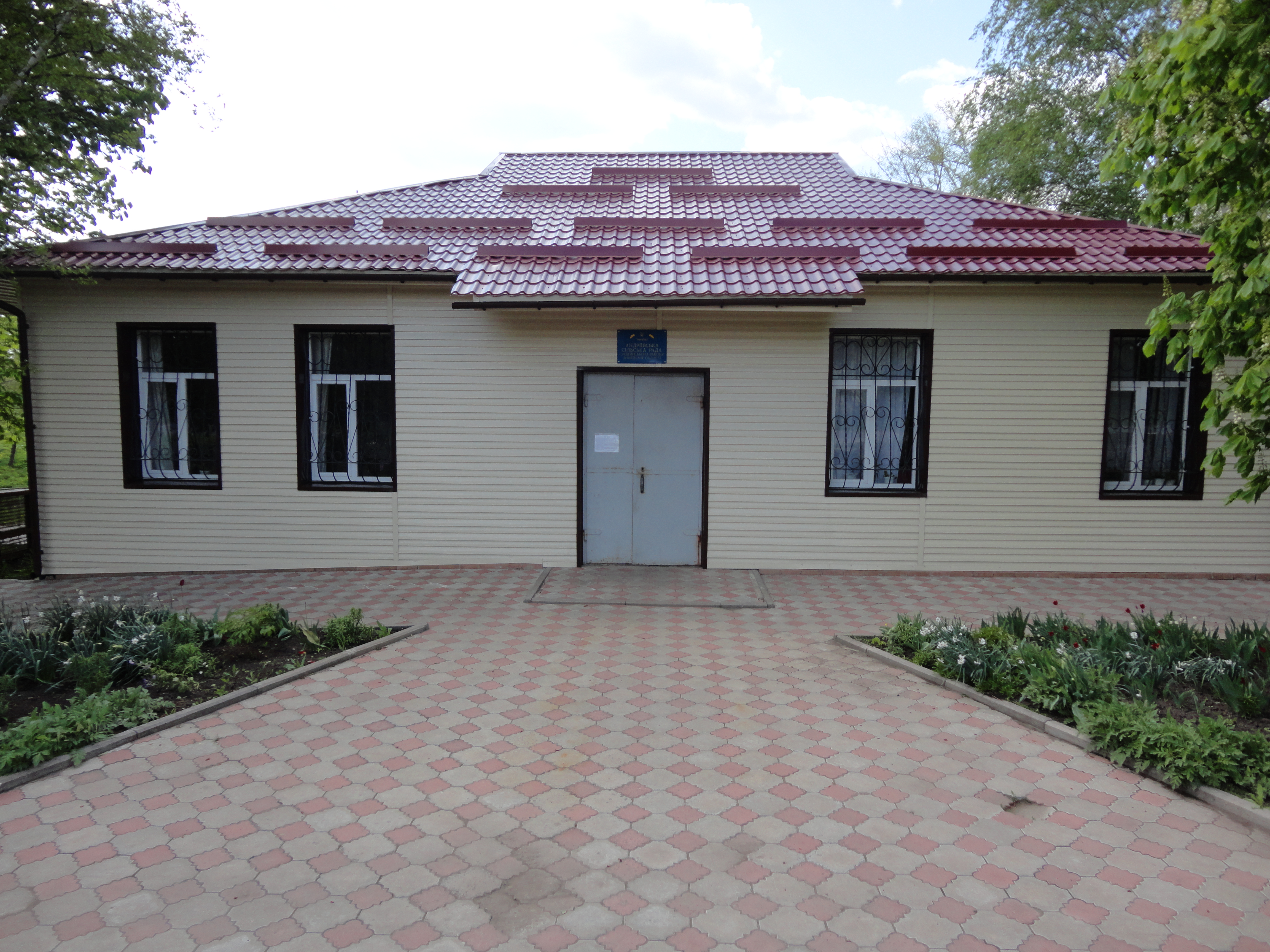 Андреевская сельская Администрация